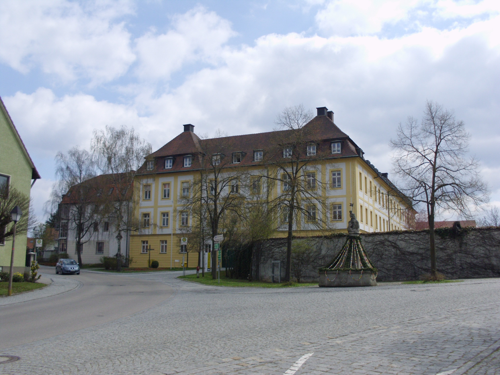 Absberg, Landkreis Weißenburg-Gunzenhausen (Bayern), Ehemaliges Deutschordensschloss, Westflügel